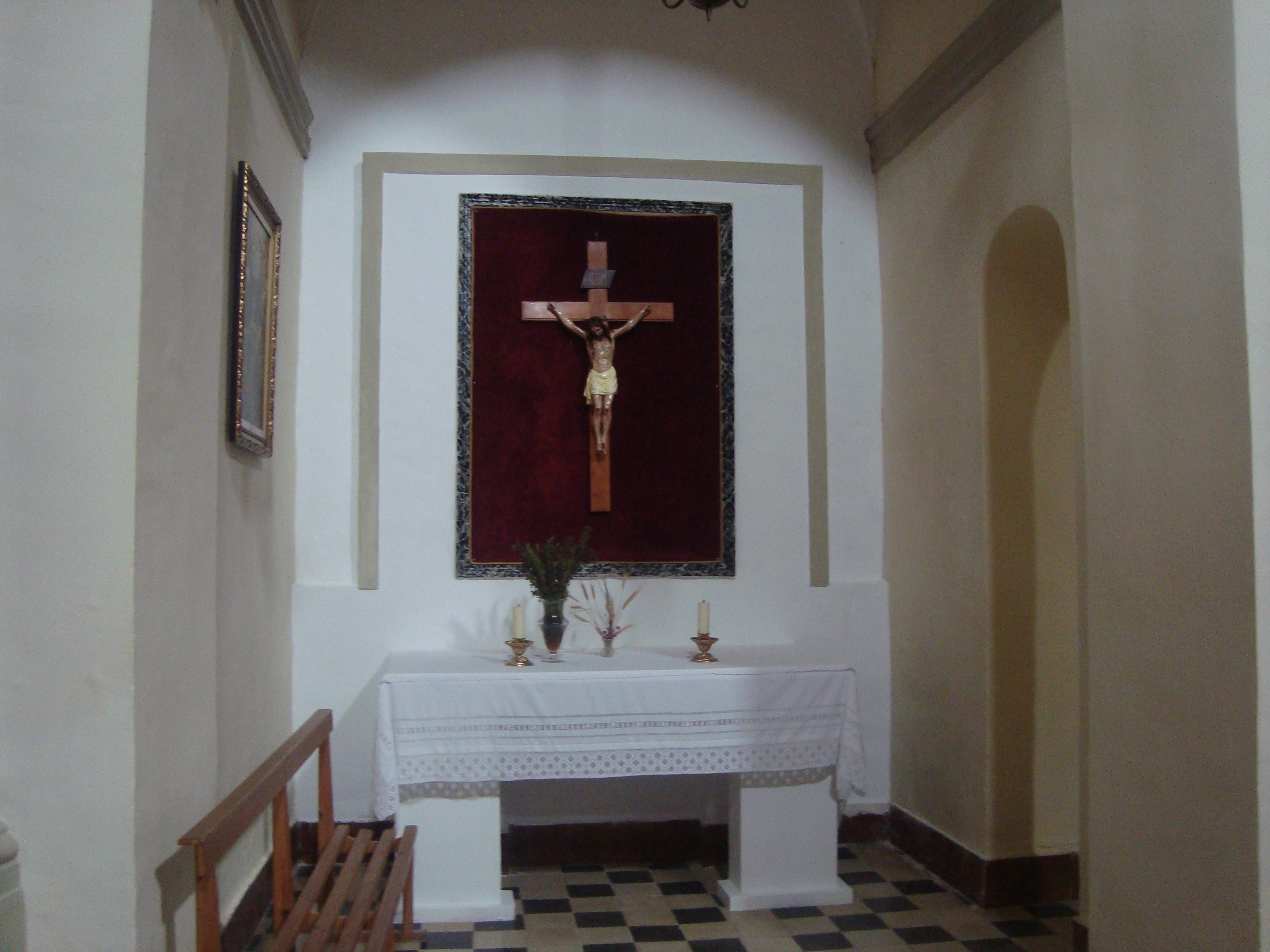 Església parroquial de Santa Quitèria (la Torre d'en Doménec) 05.120-001.